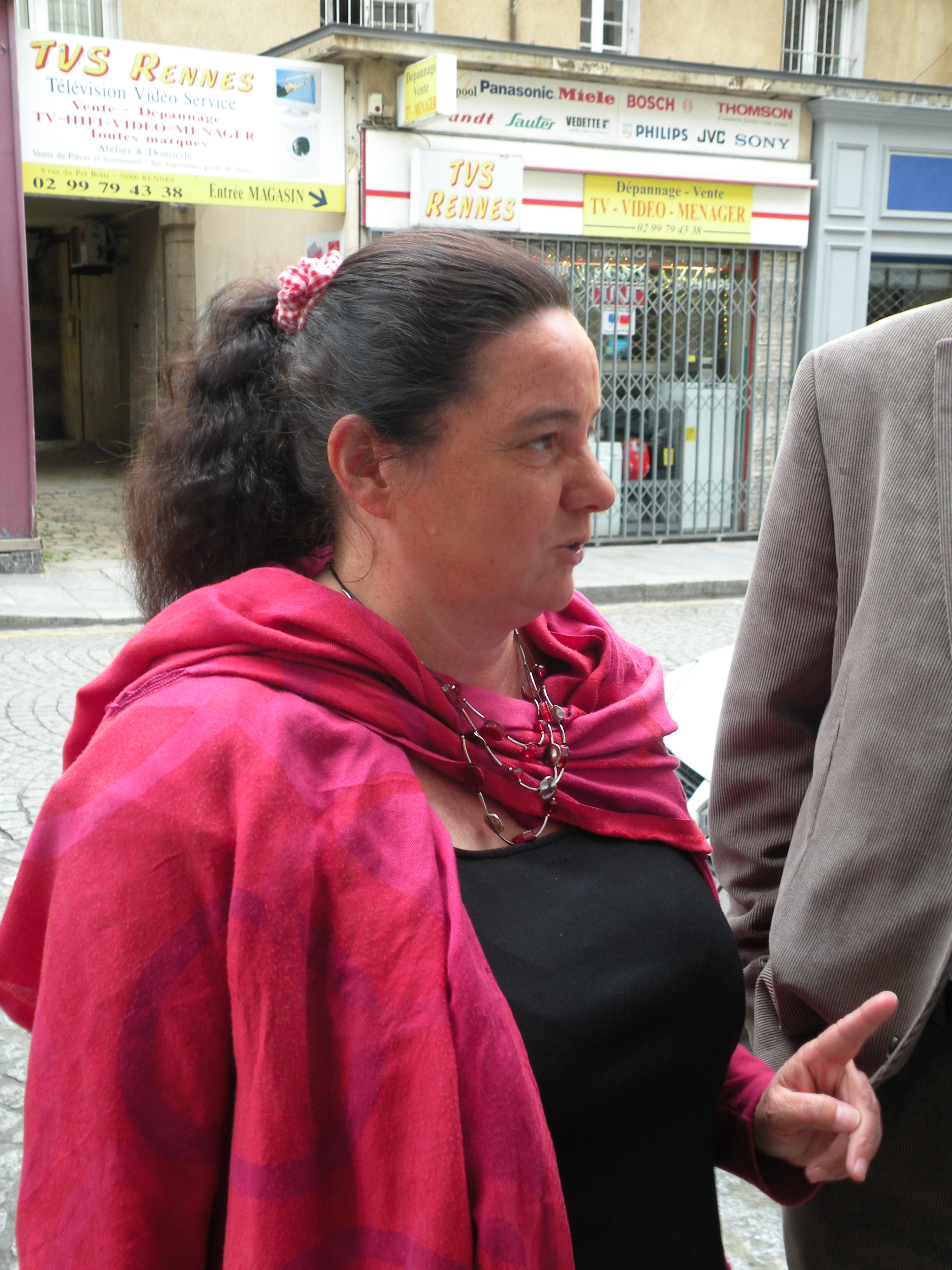 La députée Marie-Anne Chapdelaine le soir du deuxième tour des élections législatives de 2012.